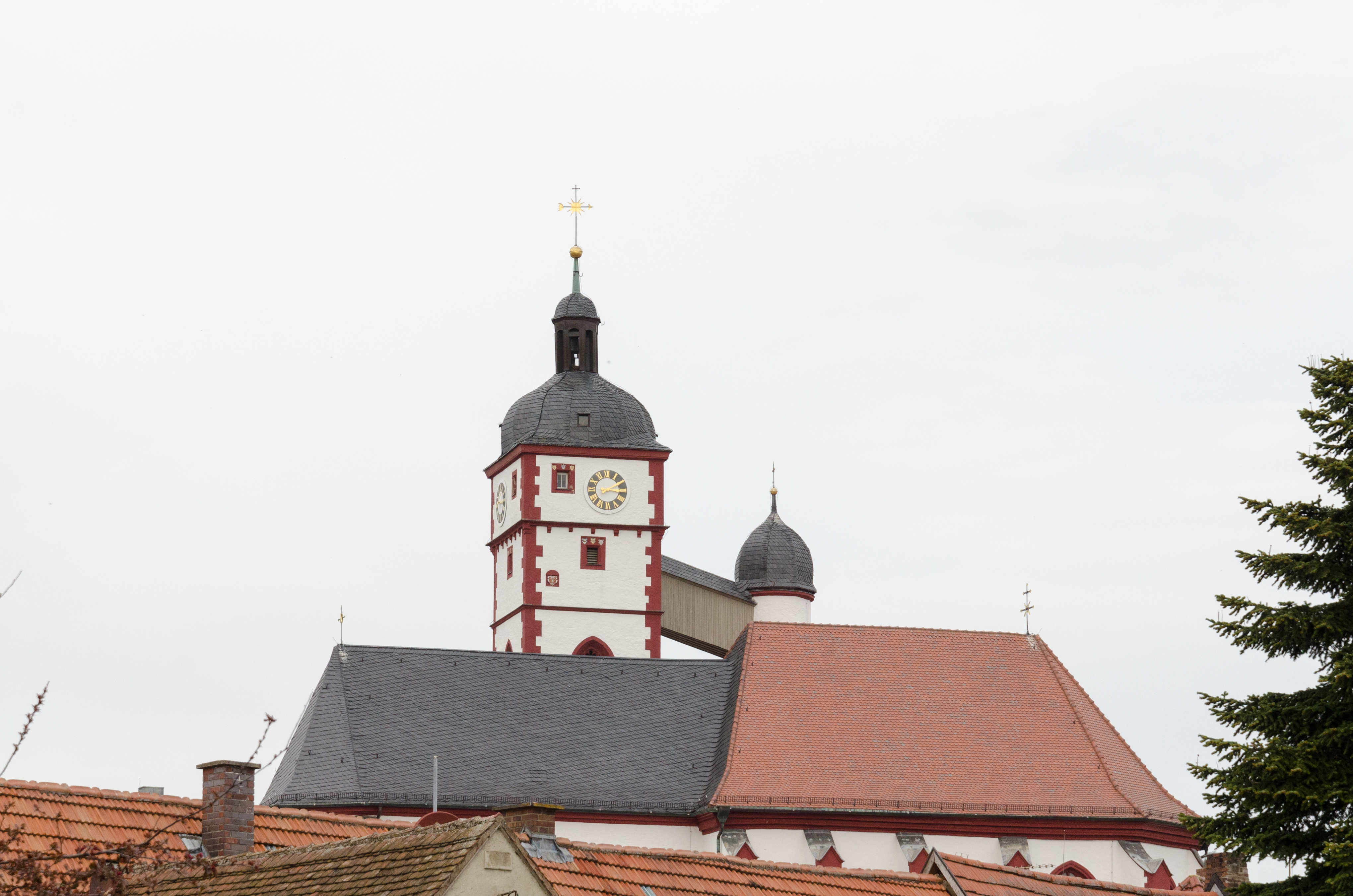 Dettelbach, St. Augustinus